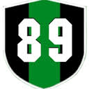 Kocaelispor'un 1989'dan bu yana tek taraftar grubudur.